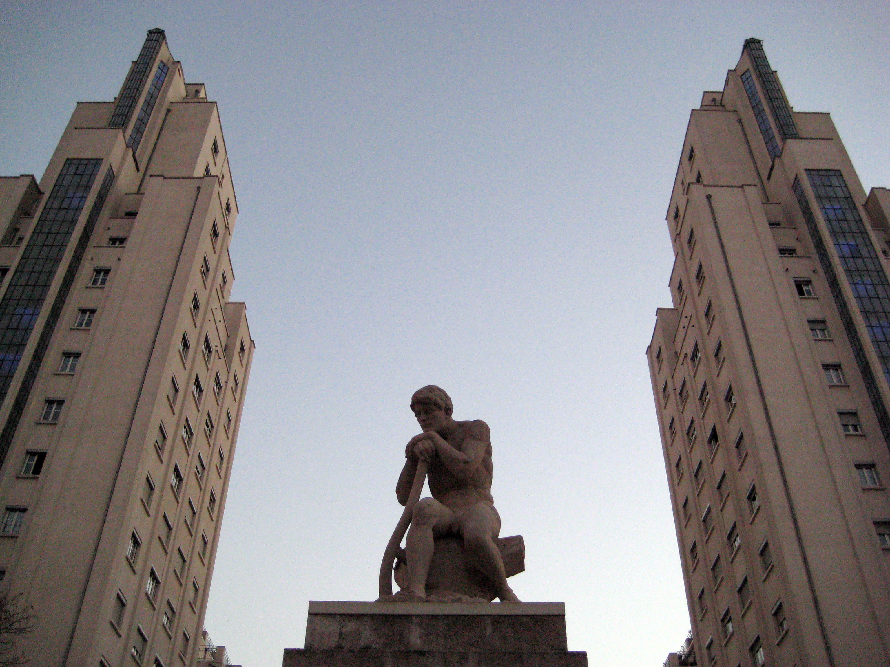 Les Gratte-ciel à Villeurbanne, l'entrée de l'avenue Barbusse, Statue: Le répit de l'agriculteur de Jules Pendariès